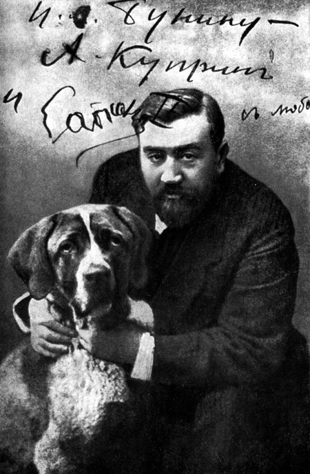 Писатель Александр Куприн с собакой породы меделян по кличке Сапсан. Фотография, подписанная Куприным и подаренная писателю Ивану Бунину